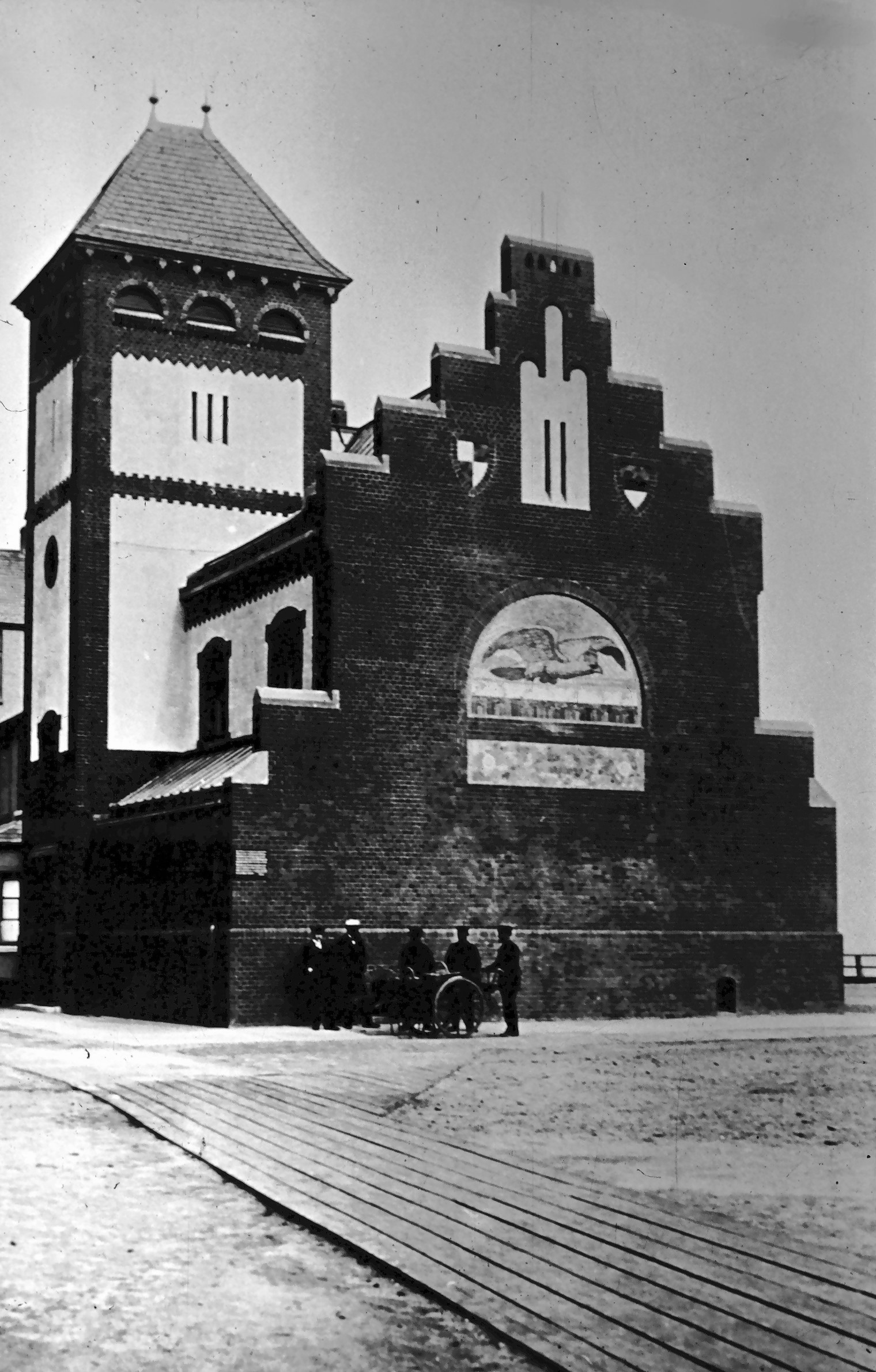 Aquarium der Biologischen Anstalt Helgoland von 1902